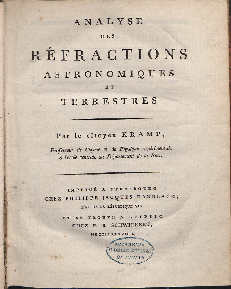 Frontespizio